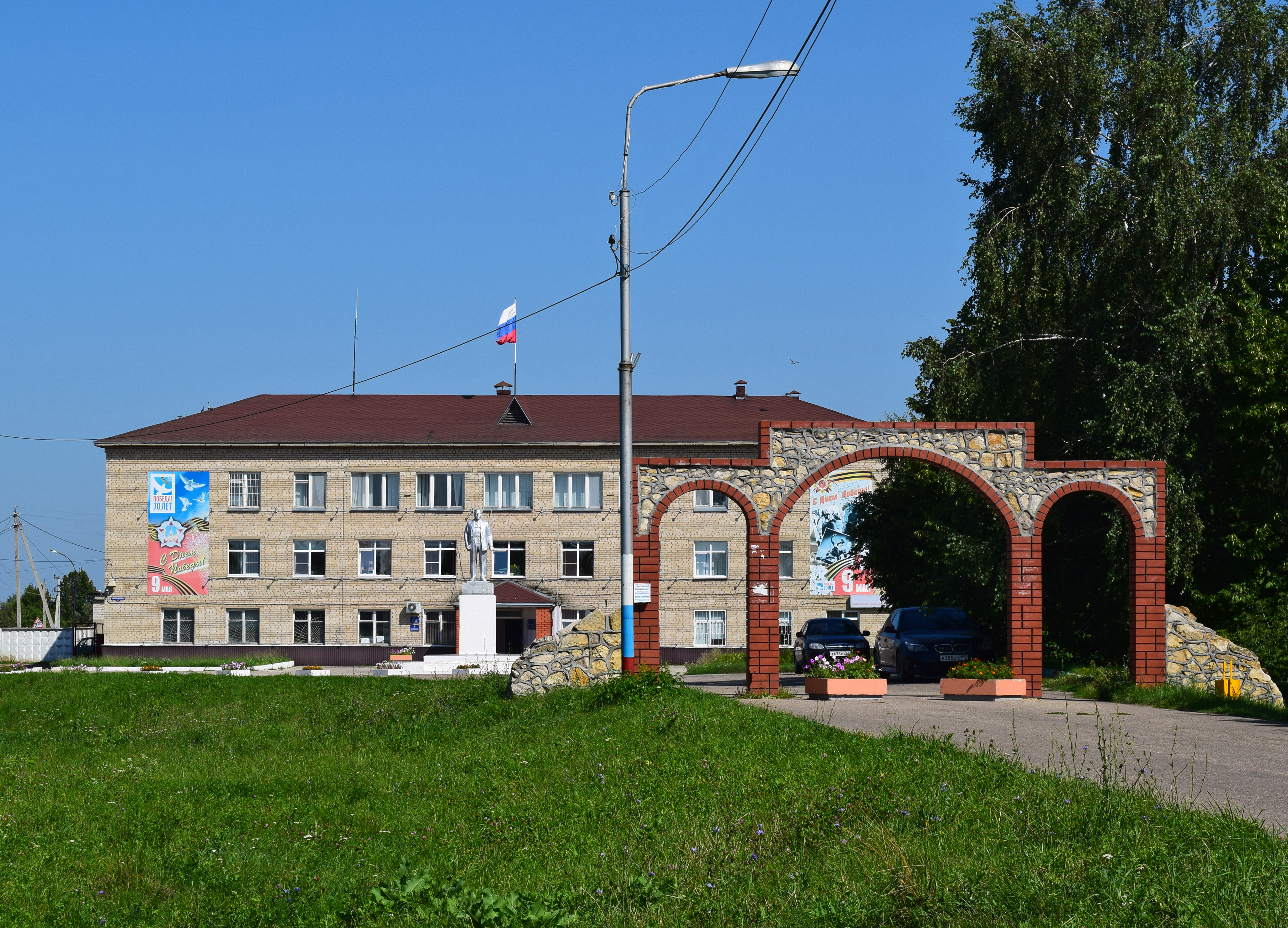 Администрация Милославского района Рязанской области